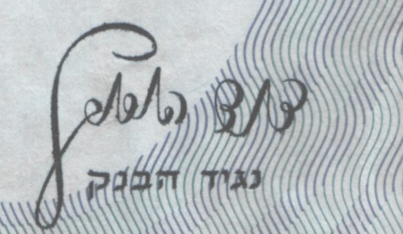 חתימה של דוד הורוביץ על לירה ישראלית אחת התשי"ח 1958